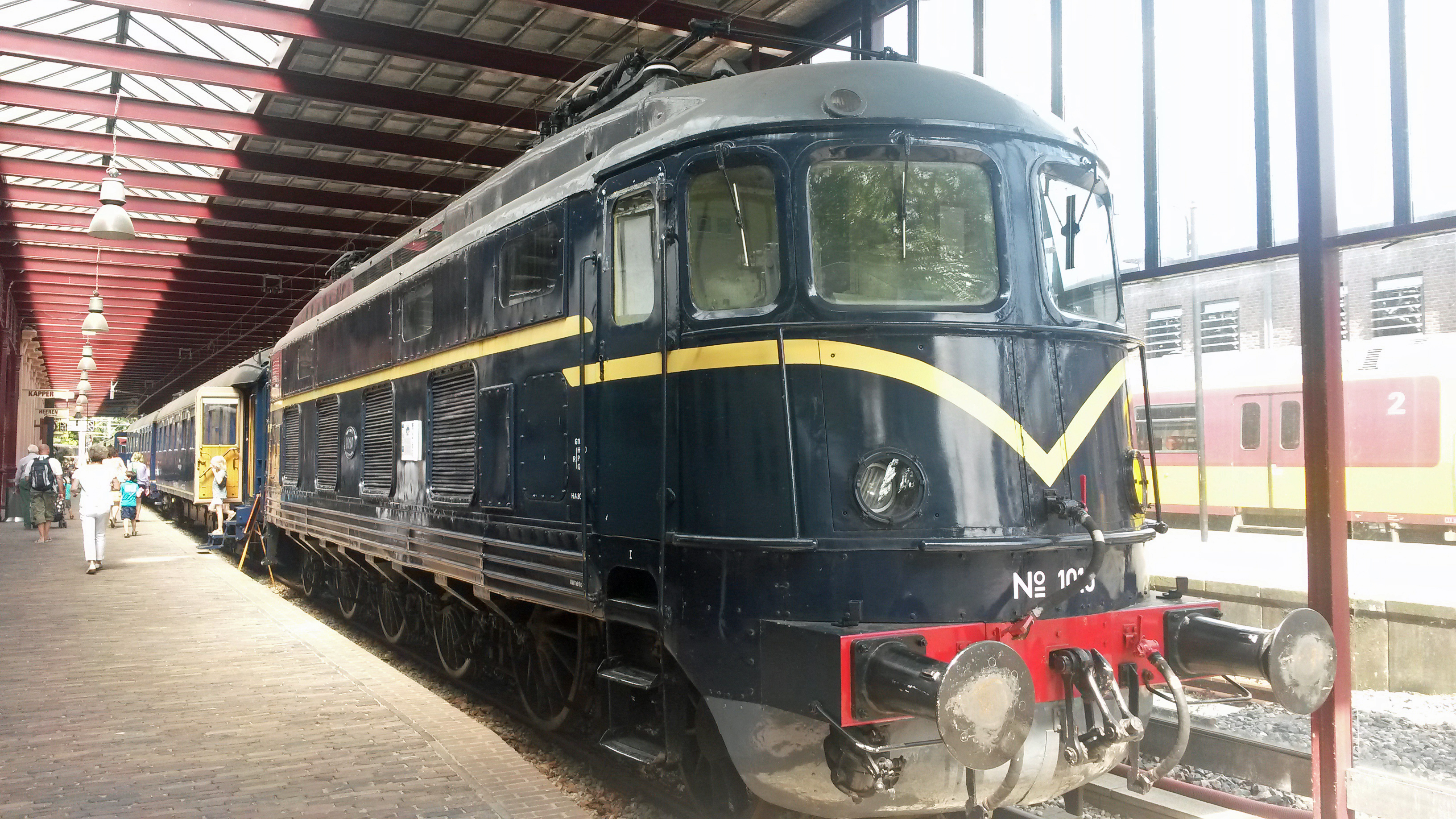 De bewaard gebleven loc uit de 1000-serie in het Nederlands Spoorwegmuseum in Utrecht.